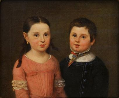 Albert Moores, Julius Kann mit seiner Schwester, 1849, Öl auf Leinwand, Potsdam Museum - Forum für Kunst und Geschichte, Foto: Elke Hübener-Lipkau